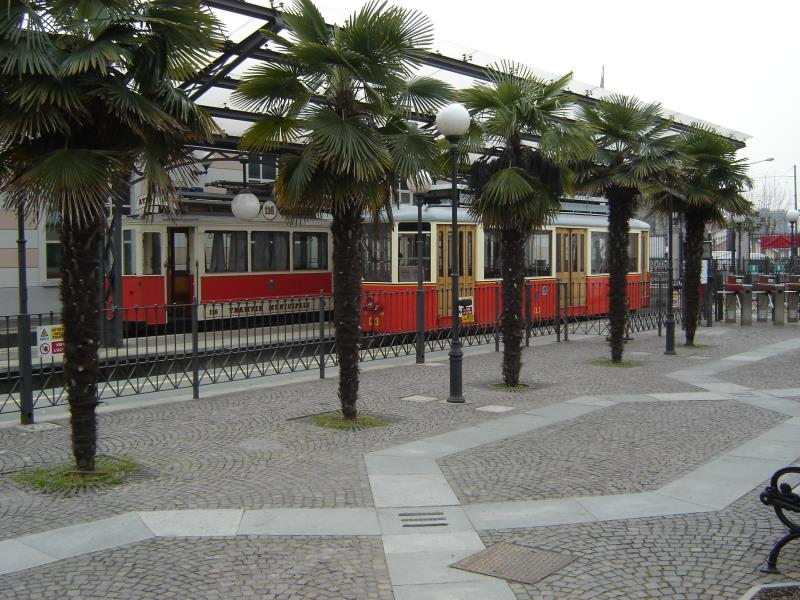 Beschreibung: Talbahnhof der Zahnradbahn Superga Quelle: selbst fotografiert